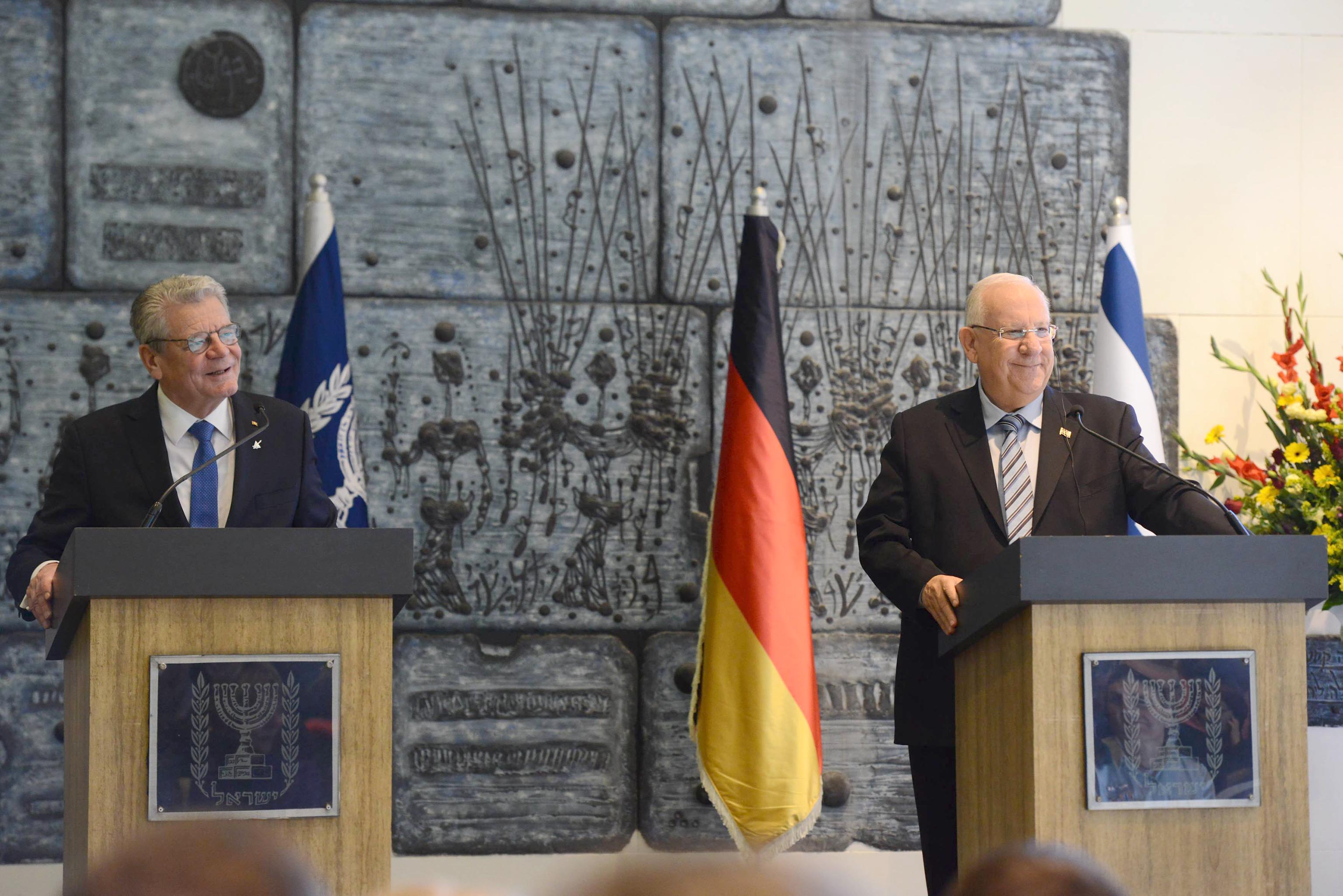 נשיא גרמניה יואכים גאוק, בעת ביקורו בישראל עם נשיא מדינת ישראל ראובן ריבלין